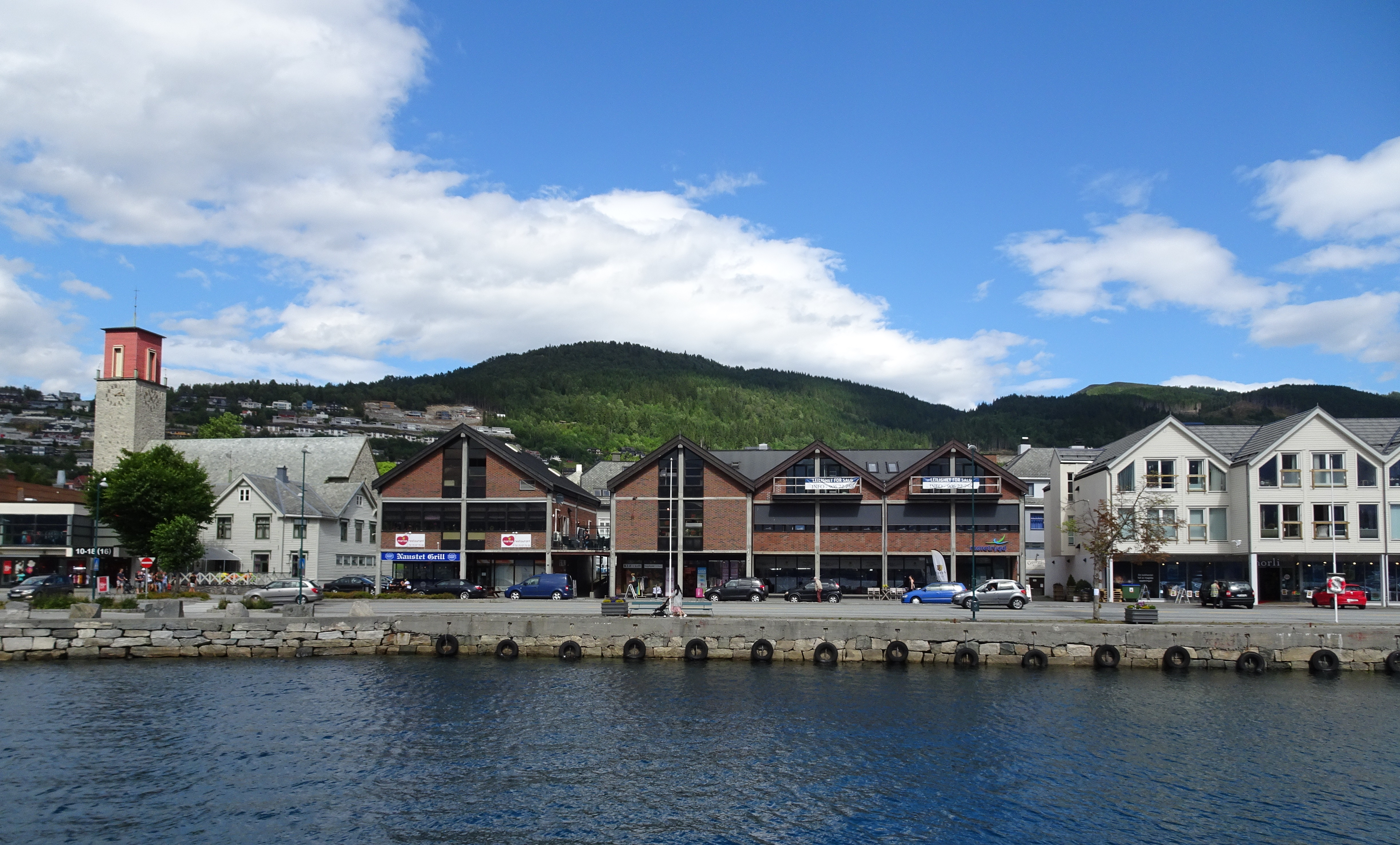 Volda havn med Sjøgata (E39) samt kirken i bakgrunnen